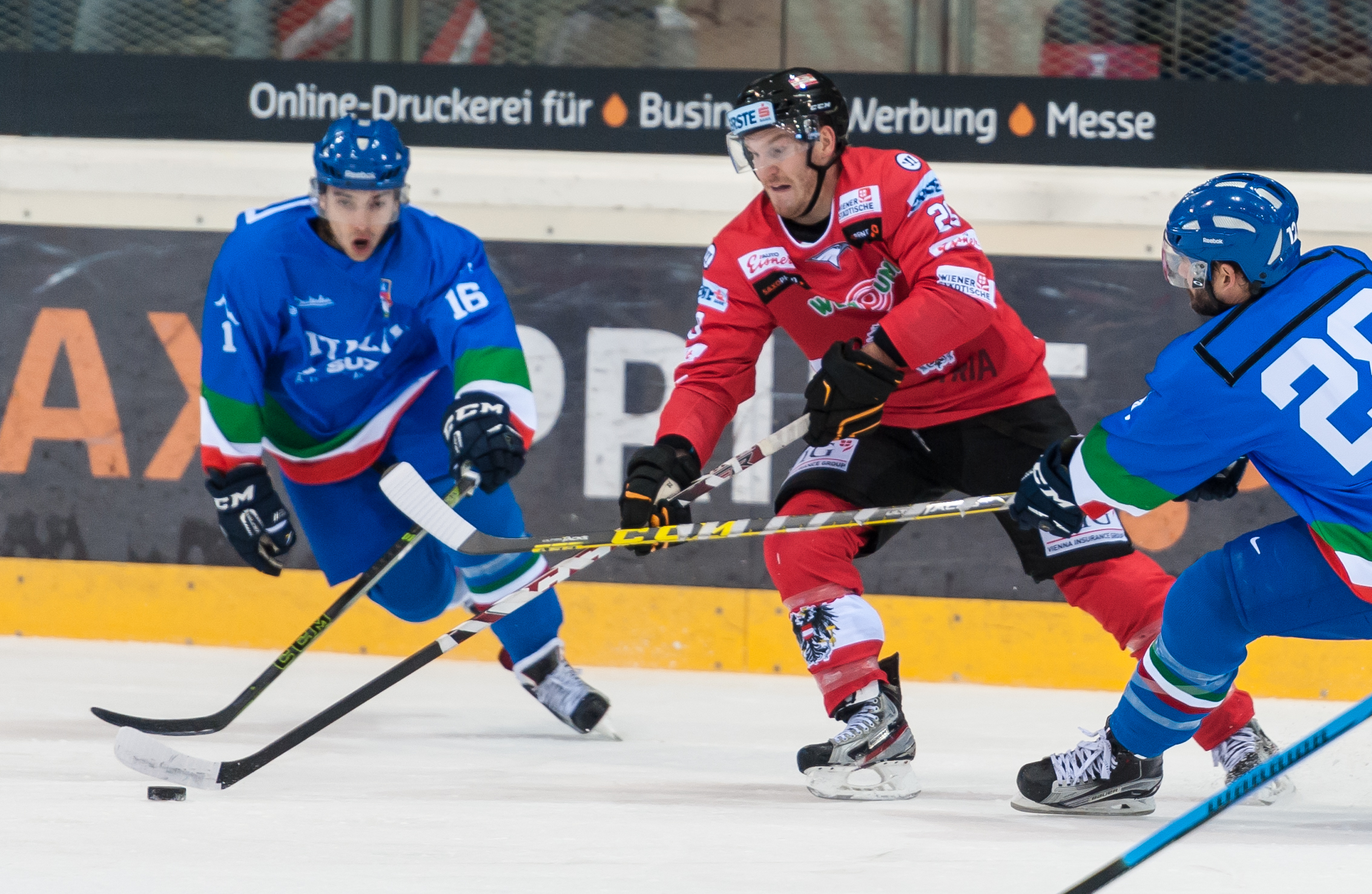 Freundschaftliches Laenderspiel - Österreich vs Italien. Bild zeigt Raphael Andergassen (ITA) und Fabio Hofer (AUT).